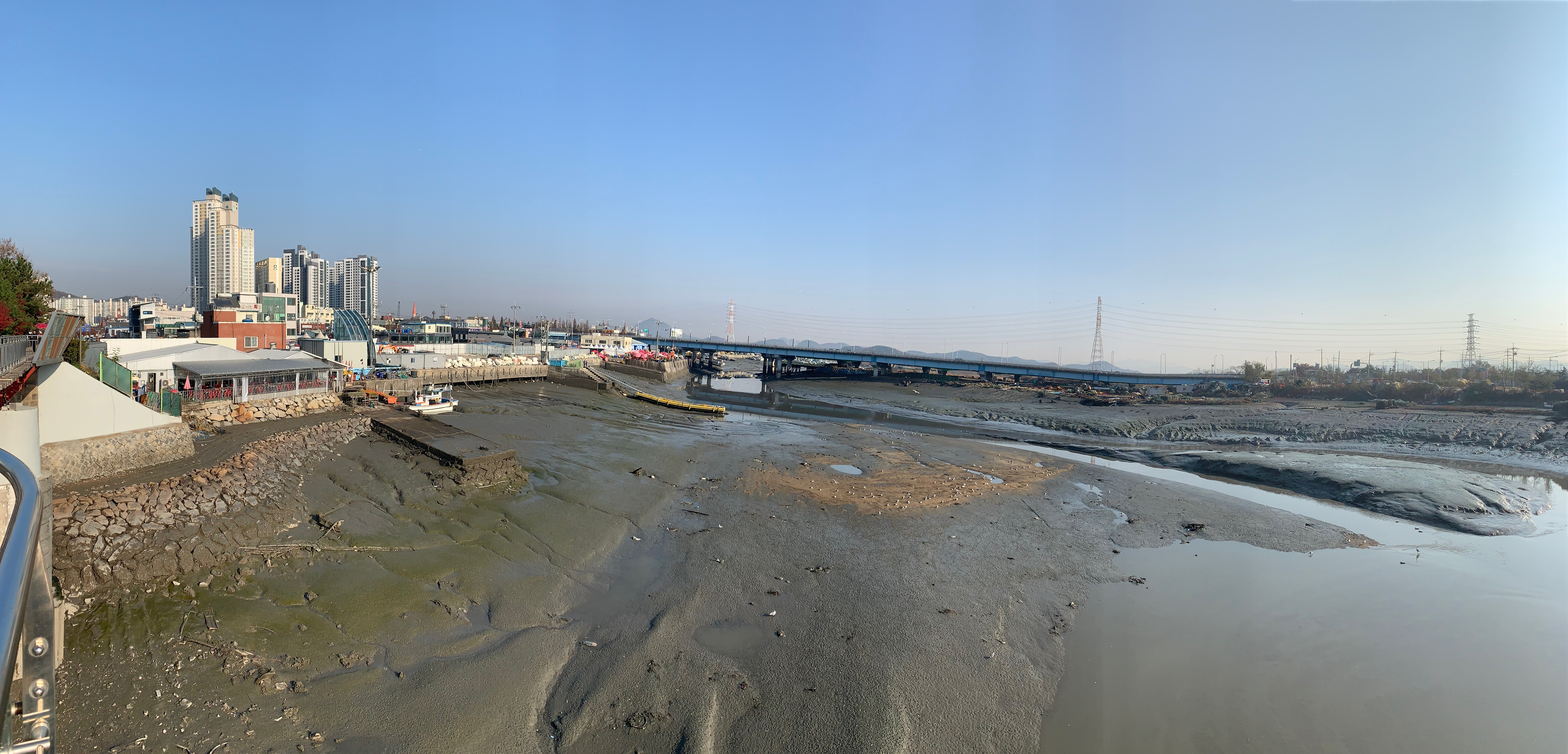 소래포구 전경